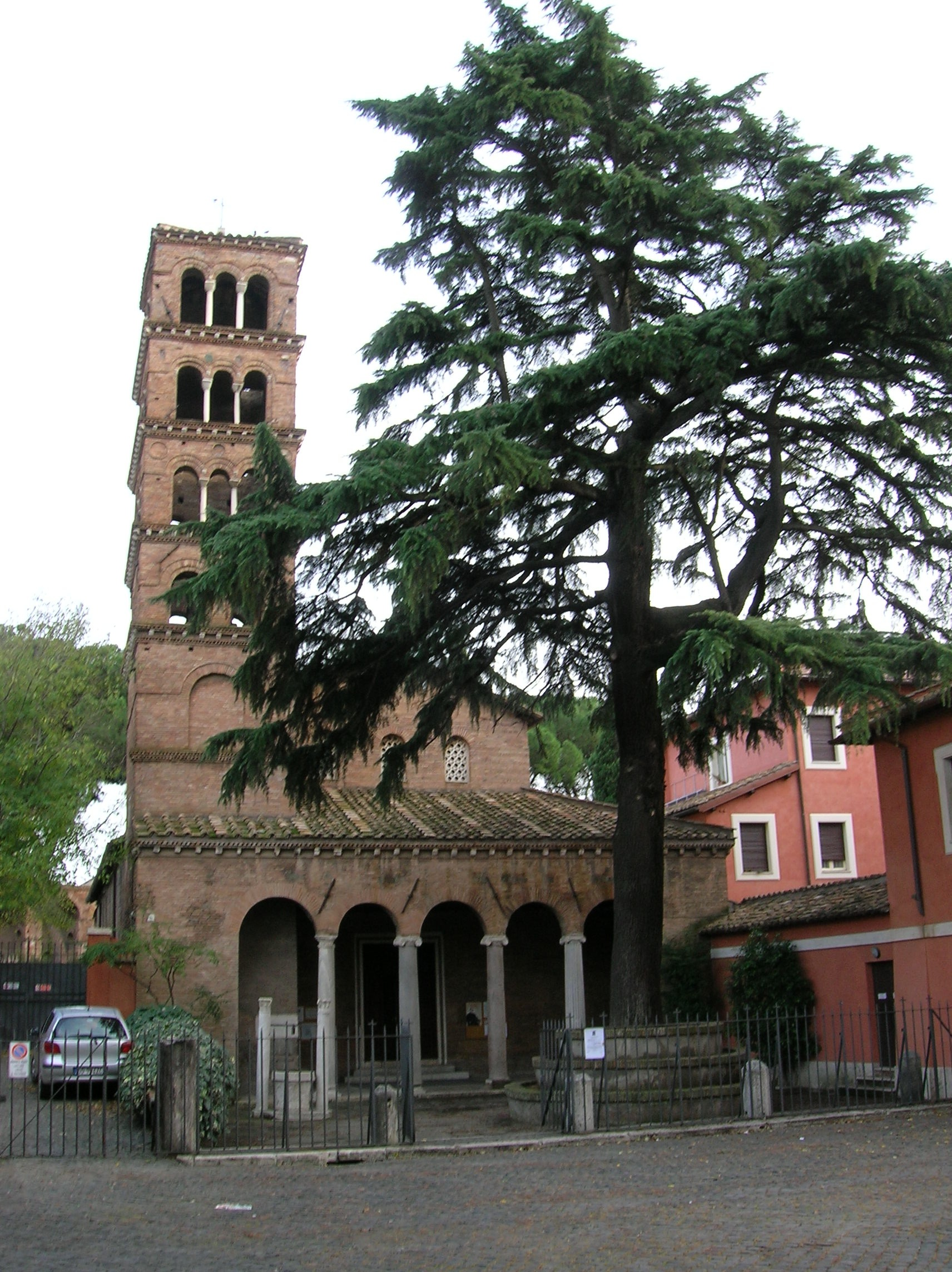 église San Giovanni a Porta Latina de Rome.